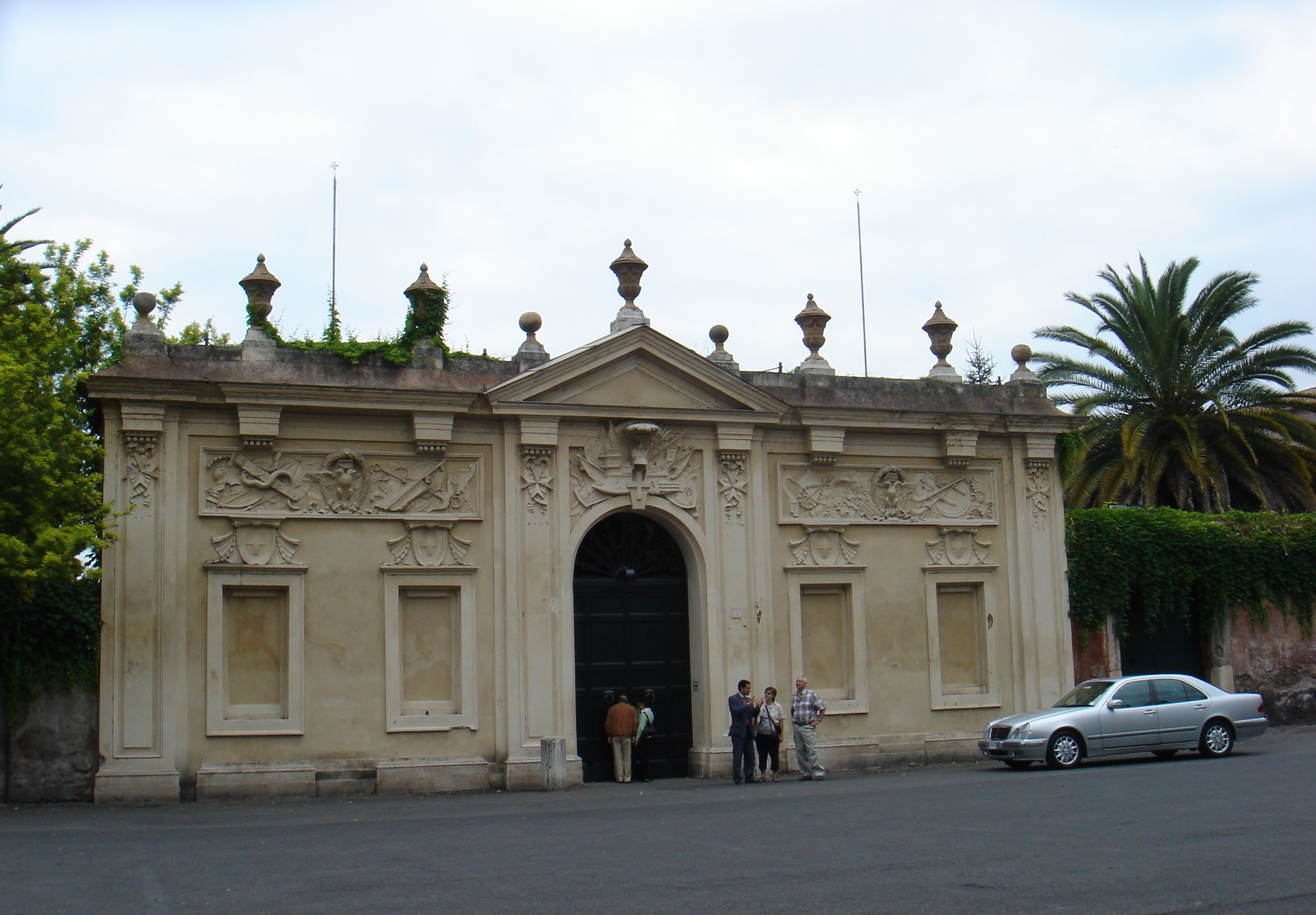 Roma , Aventino: l'ingresso alla villa dei Cavalieri di Malta. §Licensing